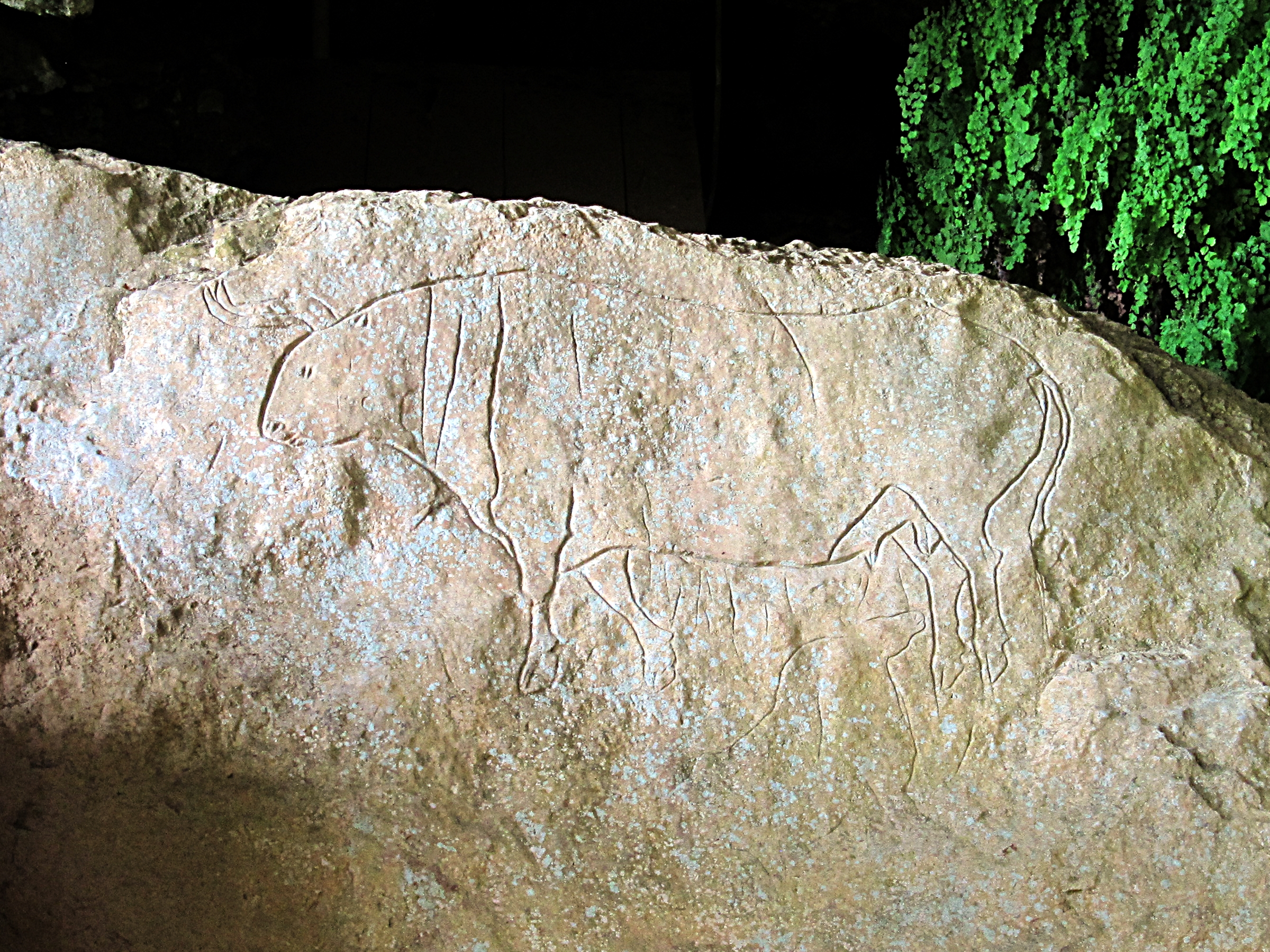 Aurochs gravés dans le refuge du site de la Grotta del Romito.